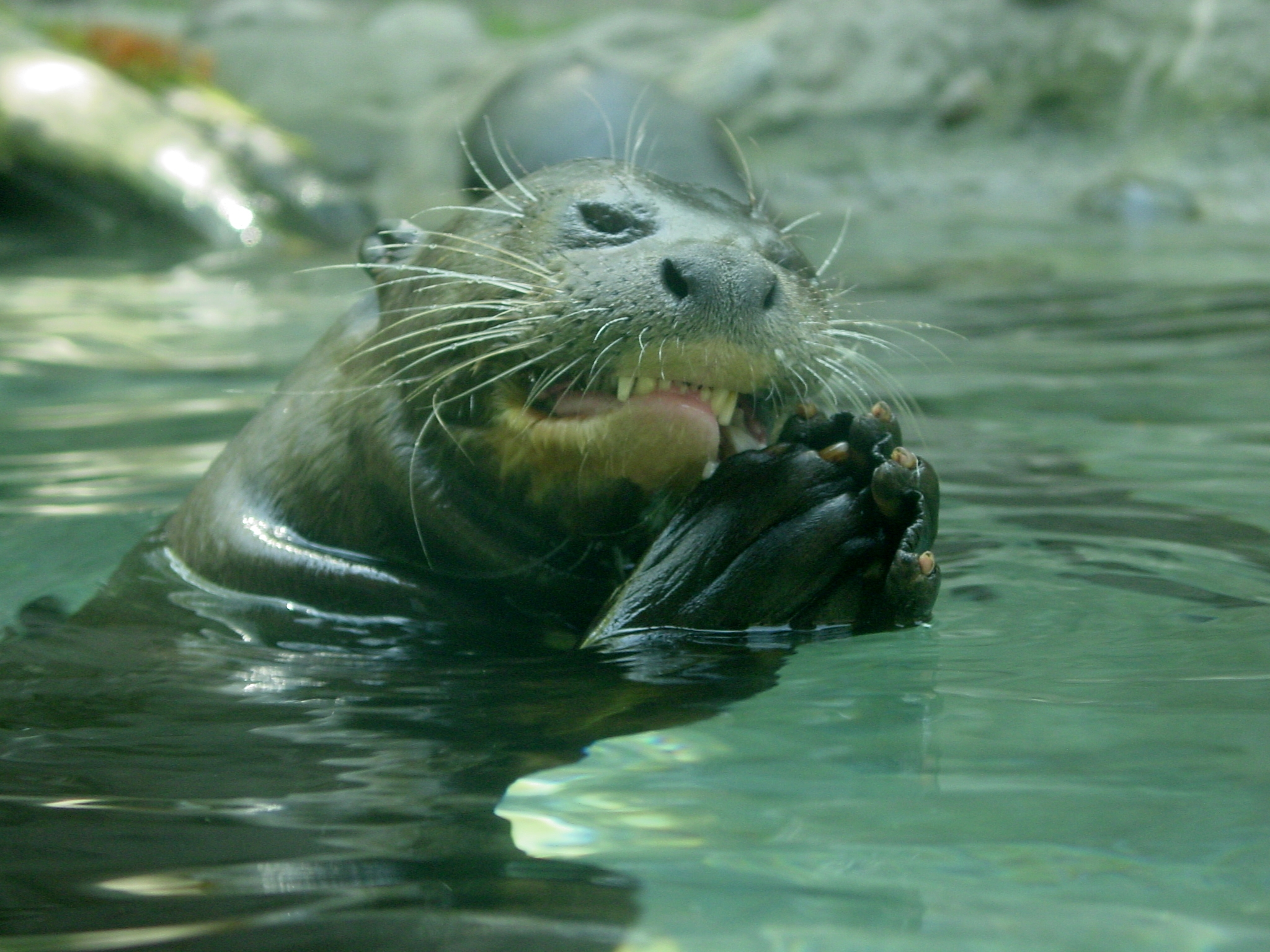 Pteronura brasiliensis - Philadelphia Zoo